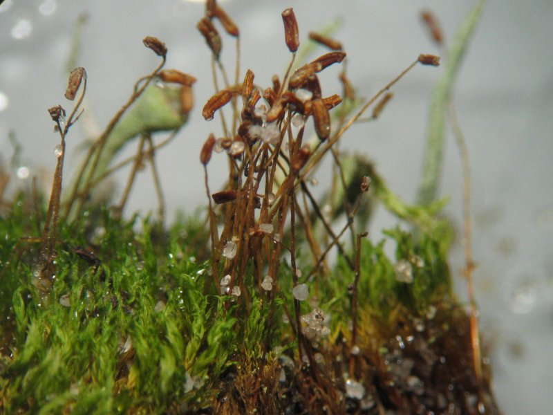 Ceratodon purpureus, etwa 5x vergr., Rostock